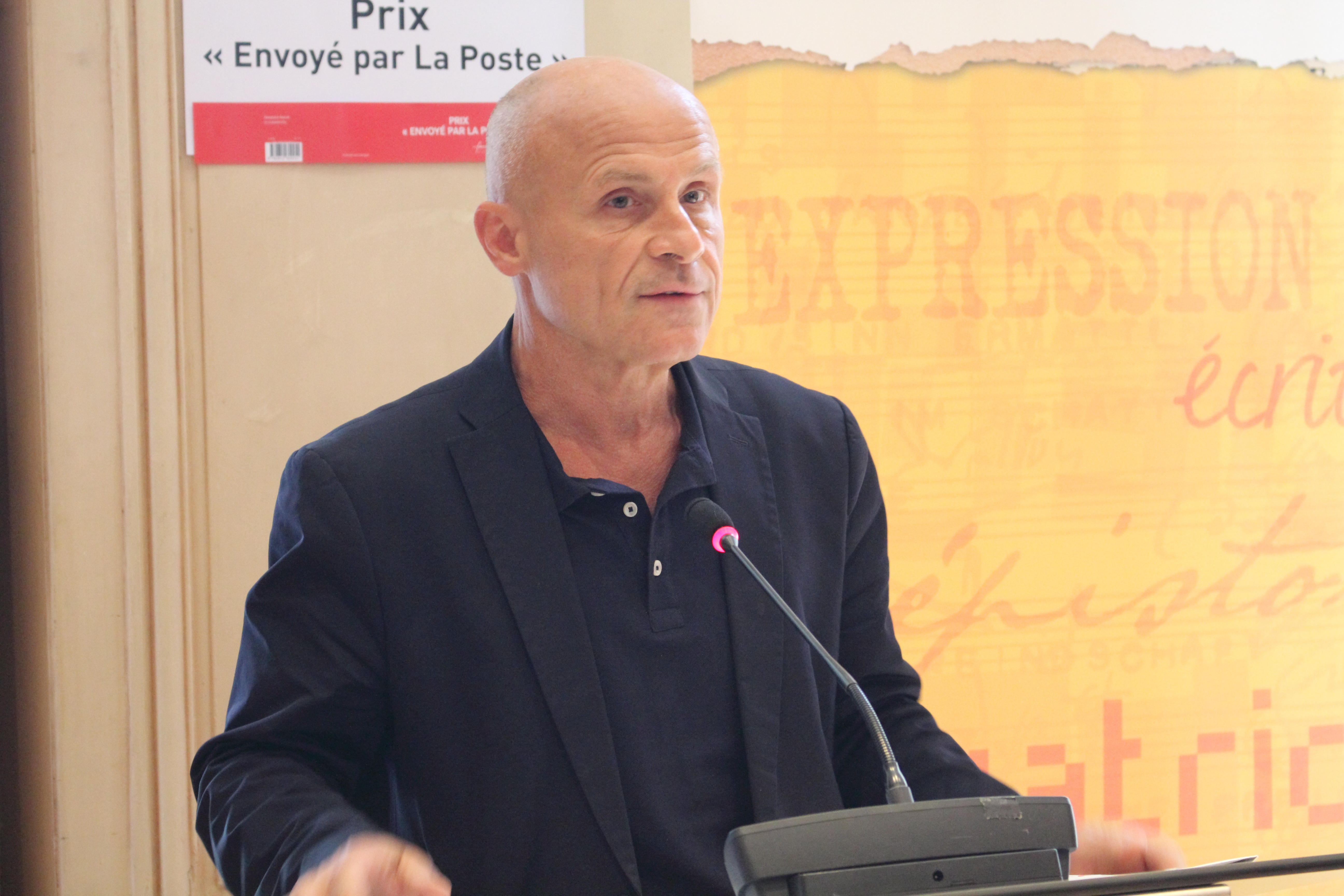 Olivier Poivre d'Arvor - Prix "Envoyé par la Poste" au Centre National du Livre